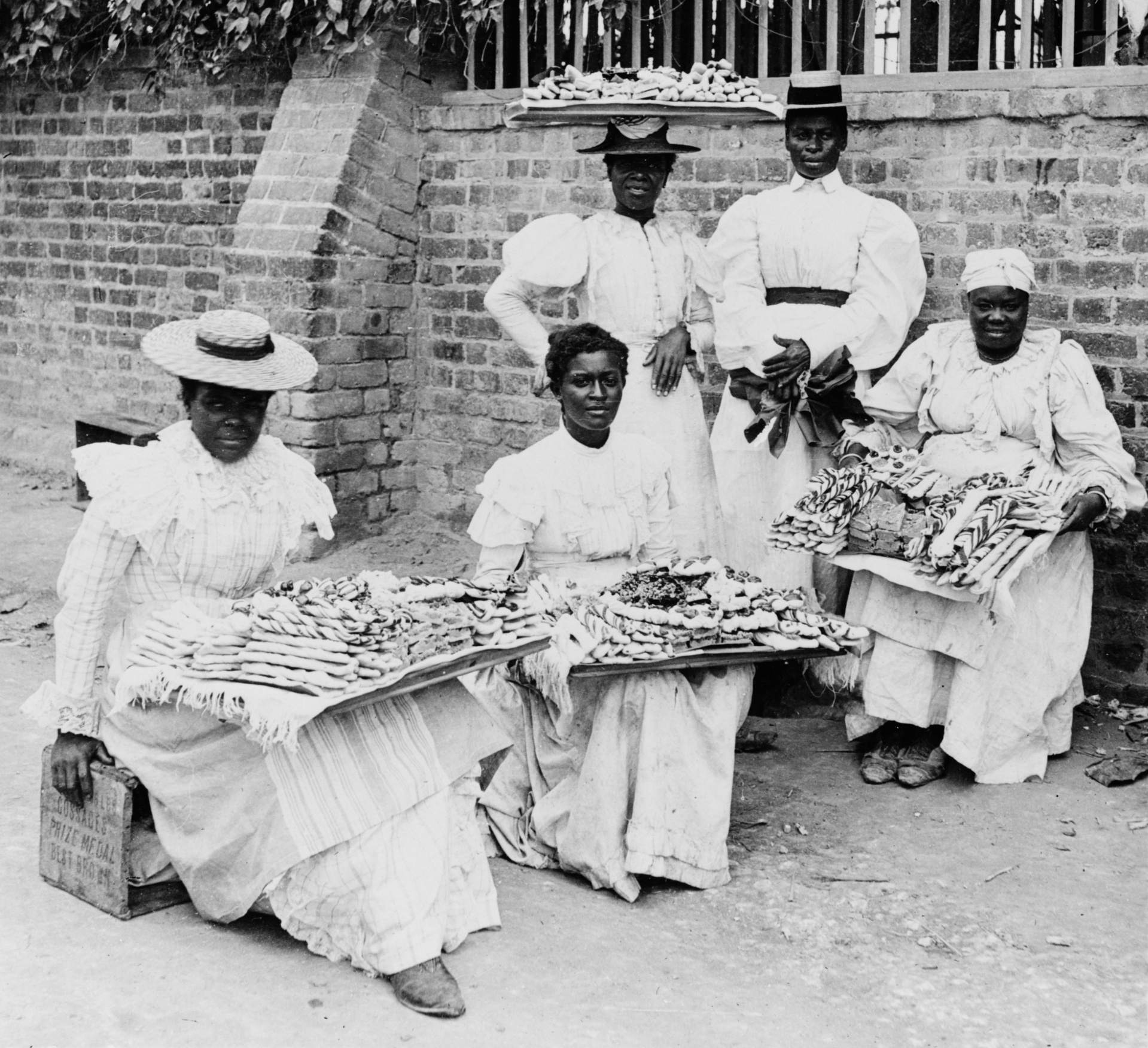 Dessert sellers, Kingston, Jamaica